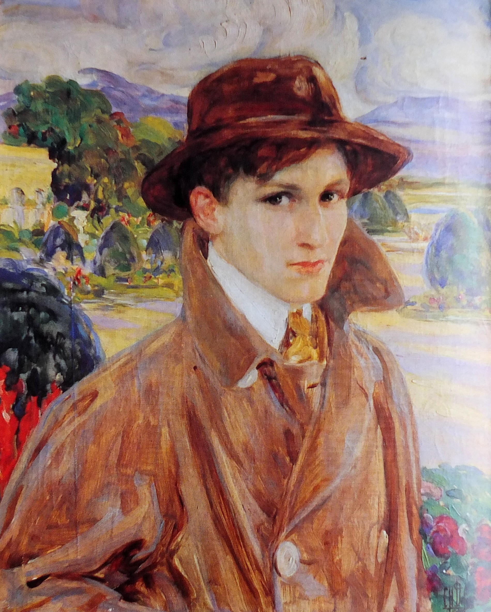 Portrait de Maurice Rostand, huile sur toile de Clémentine-Hélène Dufau (1909). Conservé à Cambo-les-Bains, villa Arnaga d'Edmond Rostand. Reproduit dans De lumière et d'ombre: Clémentine-Hélène Dufau (Quinsac, 1869- Paris, 1937), de Mayi Milhou, éditions Art & Arts, 1997 - (ISBN : 2-911059-03-4) - Photo de cette reproduction par Siren-Com.